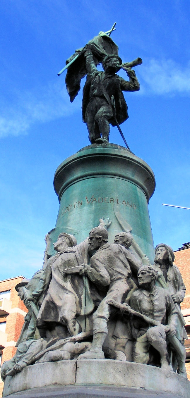 Boerenkrijgstandbeeld te Hasselt (België) (nov 2004) - eigen foto